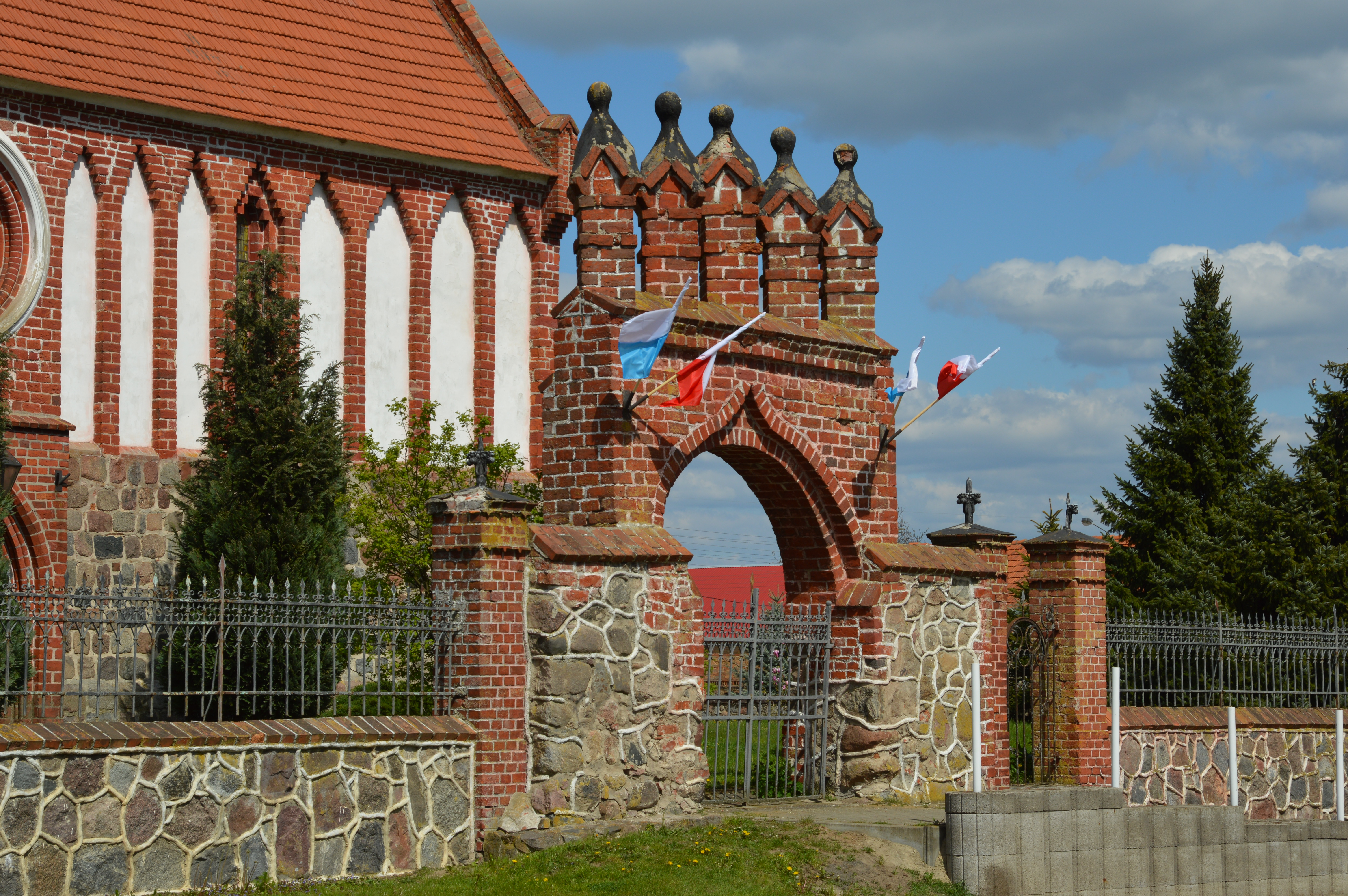 Raduń - zespół kościoła filialnego p.w. Matki Boskiej Szkaplerznej: ogrodzenie z bramą, mur., XIV